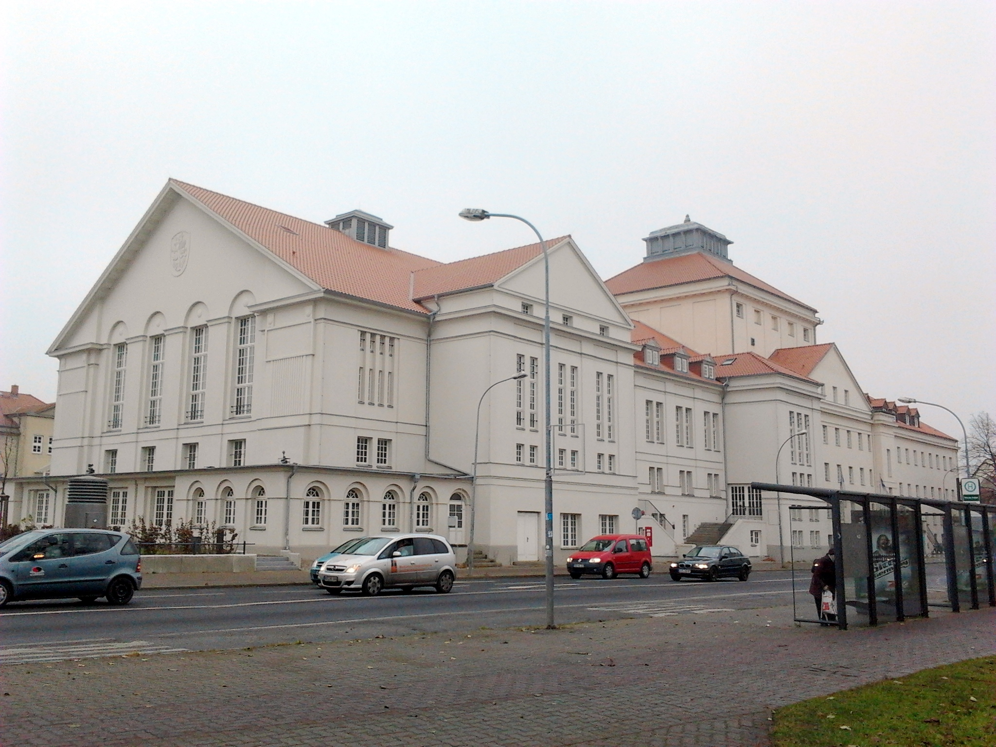 Greifswald, Stadthalle an der Anklamer Straße